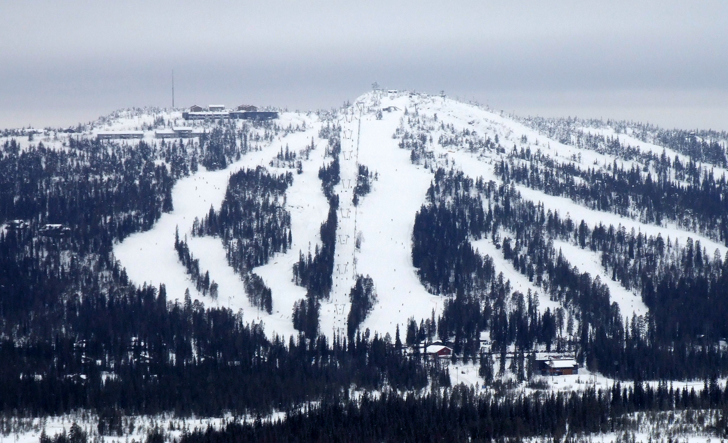 Iso-Syöte ski resort seen from another ski-resort nearby, Pikku-Syöte (Syötekeskus). In Pudasjärvi, Finland.